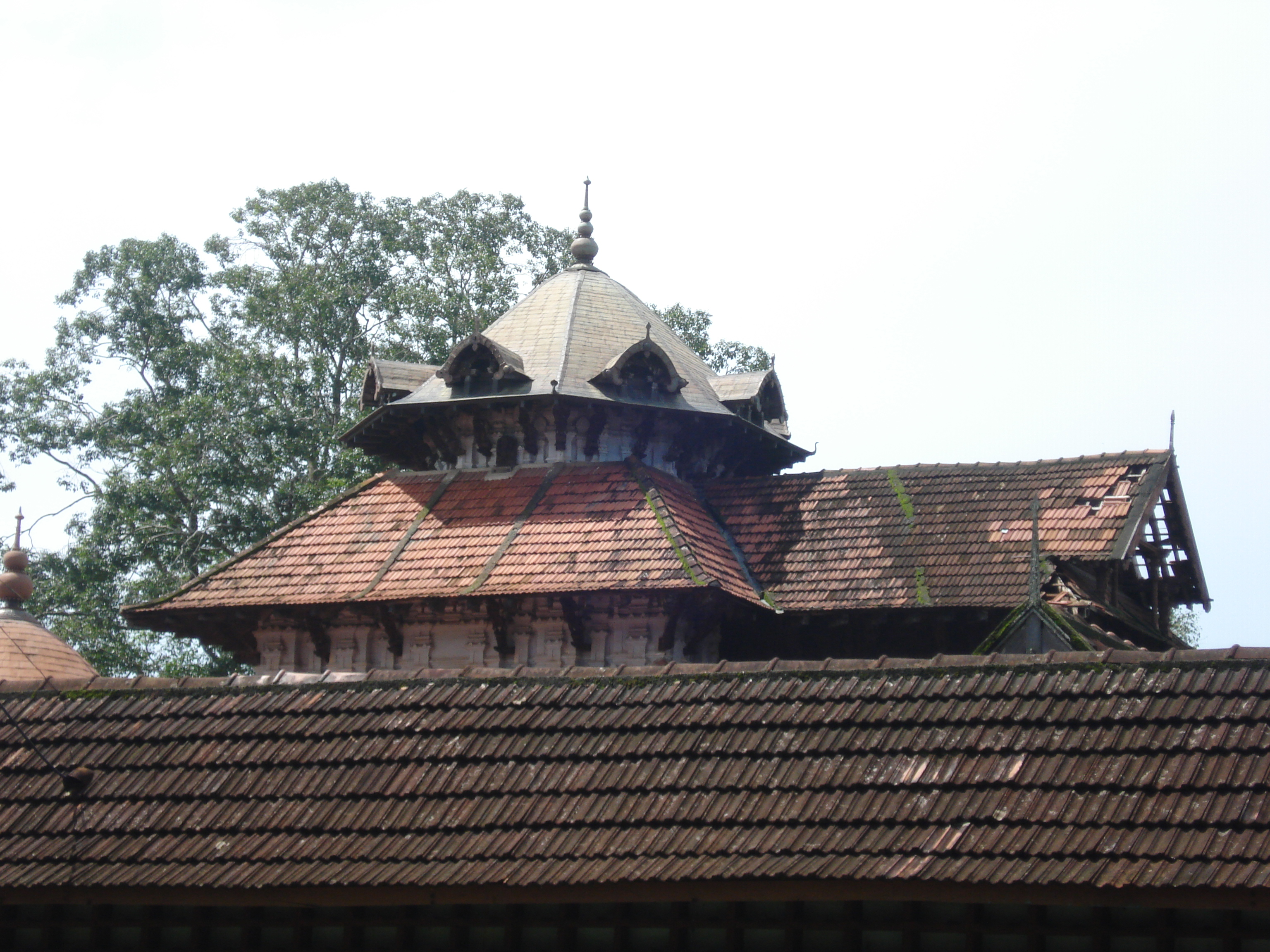 മീനമാസം പൂയം നാളിൽ ‍പെരുവനം പൂരം ആഘോഷിക്കുന്നു.